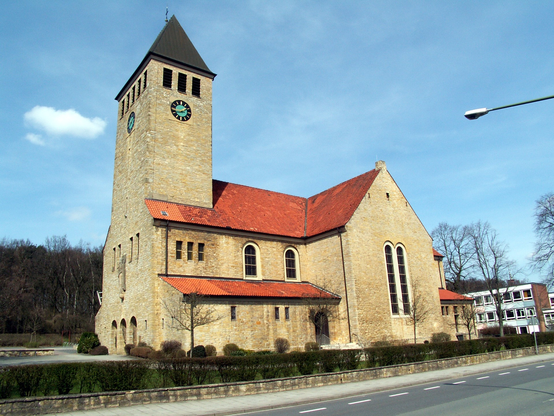 kath. Rosenkranzkirche in Osnabrück, Stadtteil Schinkel-Ost, Ansicht von Süden